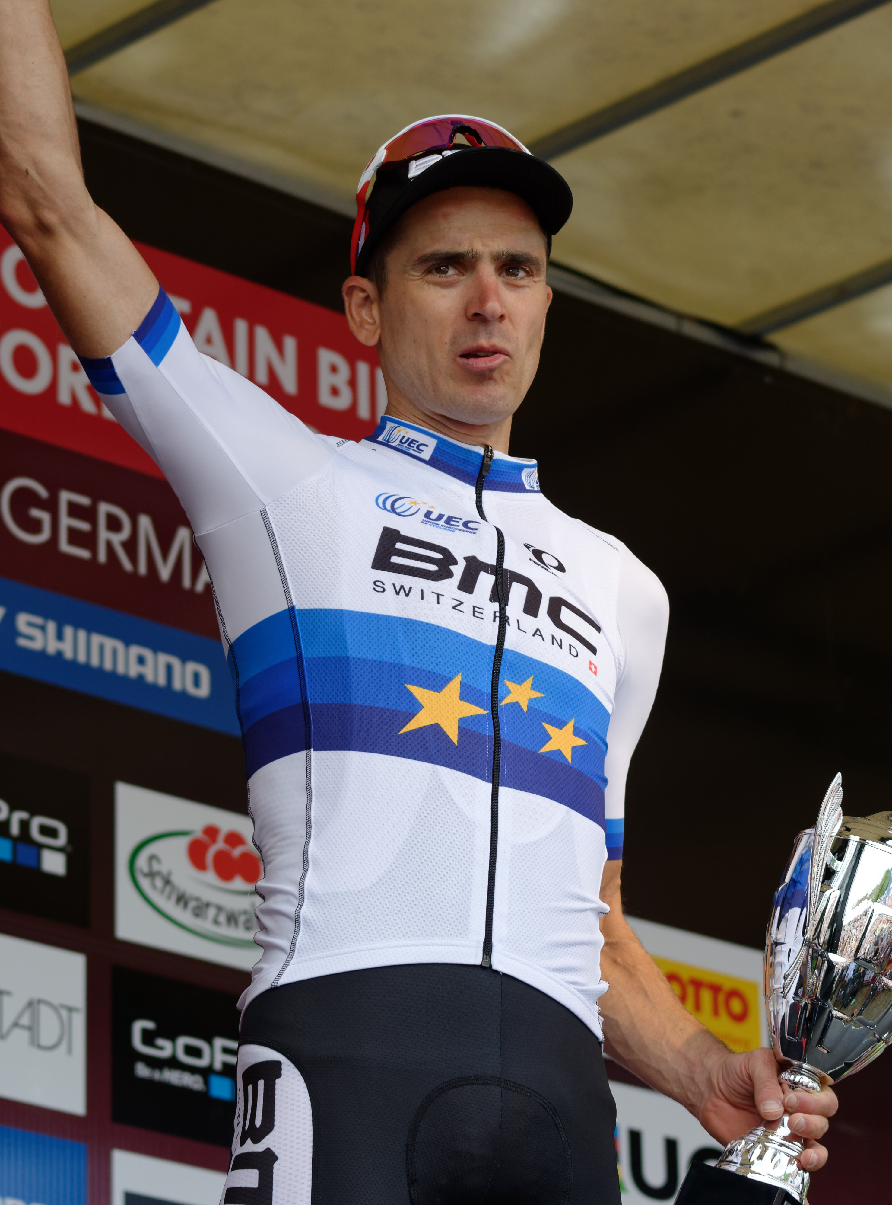 D71_7636_DxO